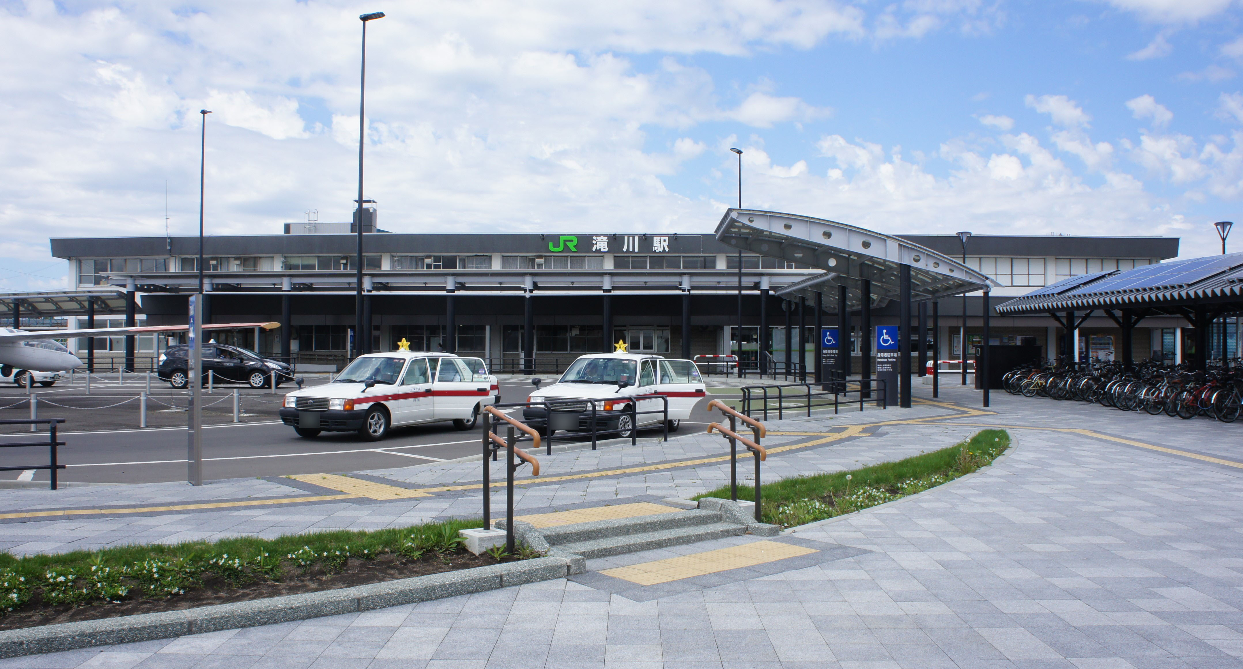 JR函館本線/根室本線・滝川駅の駅舎